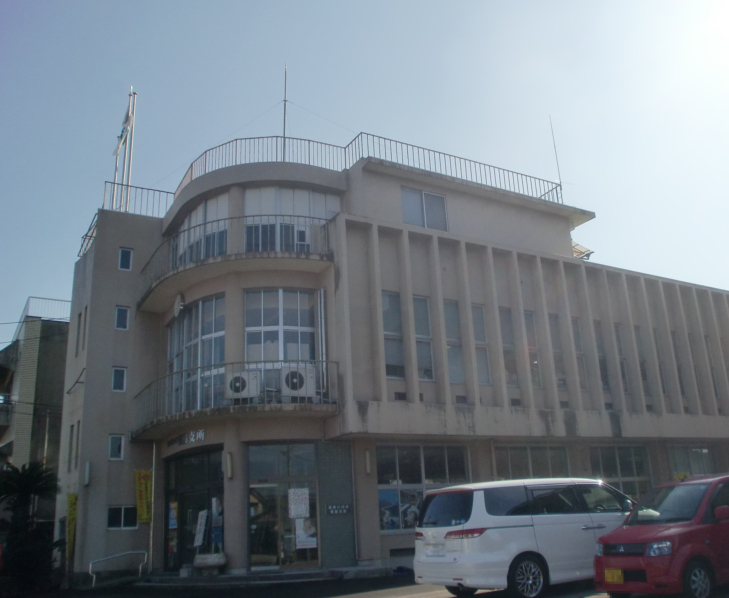 薩摩川内市役所樋脇支所（旧樋脇町役場）の外観。修正済み